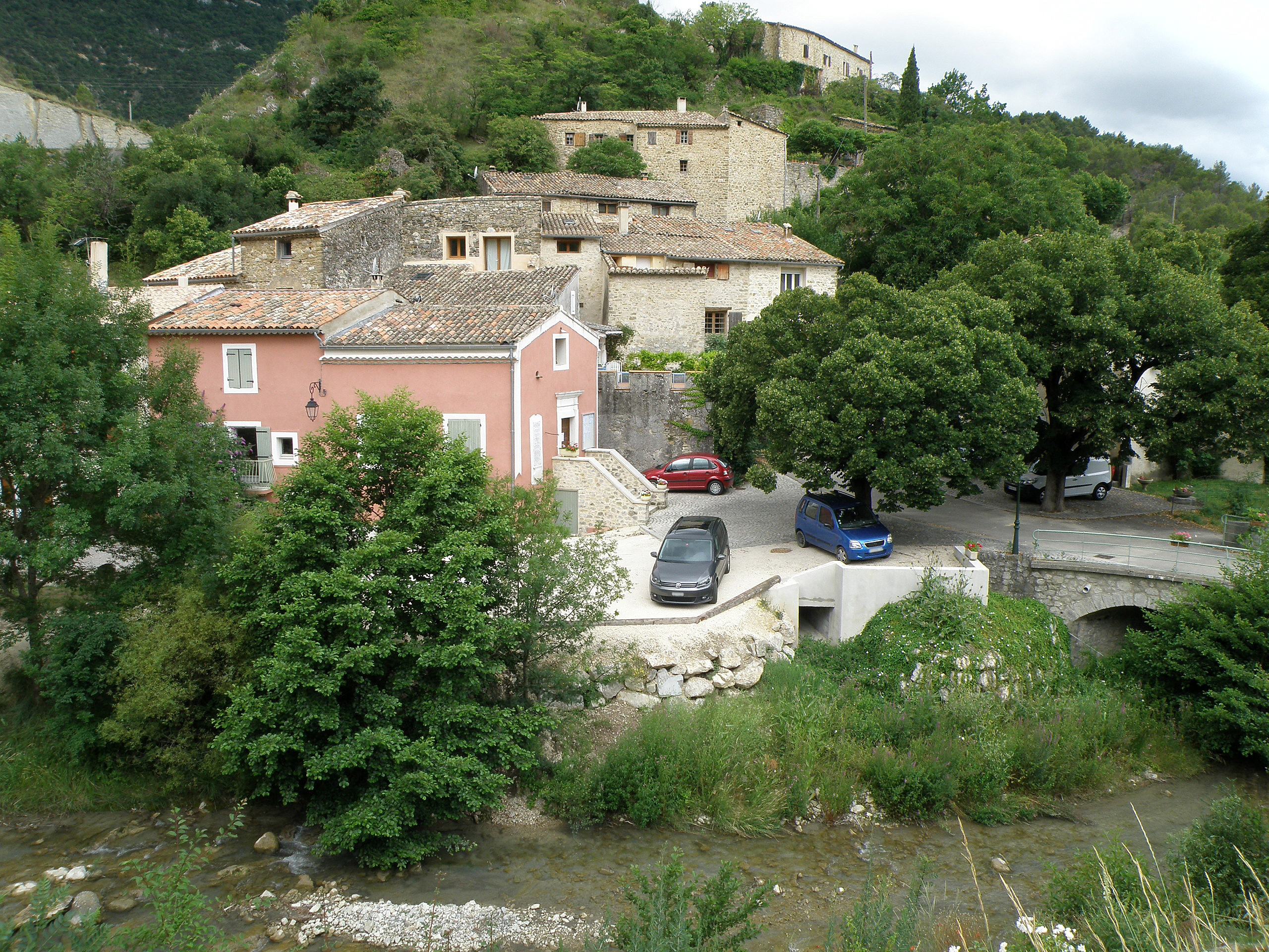 Eygaliers (Drôme, France). Vue générale du bourg. À l'avant-plan, ruisseau de Derboux.